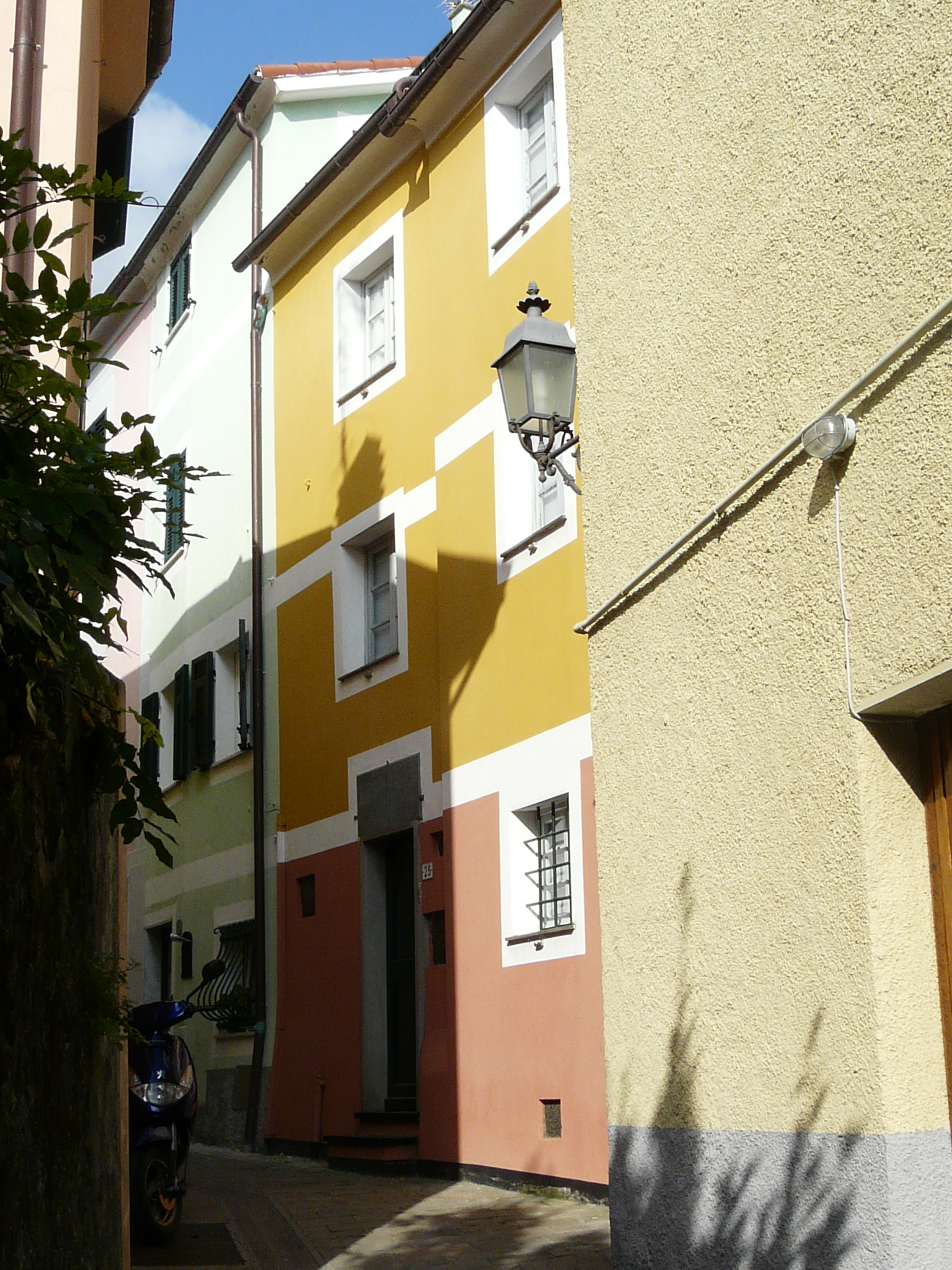 Casa natale di sant'Agostino Roscelli, Bargone, Liguria, Italia